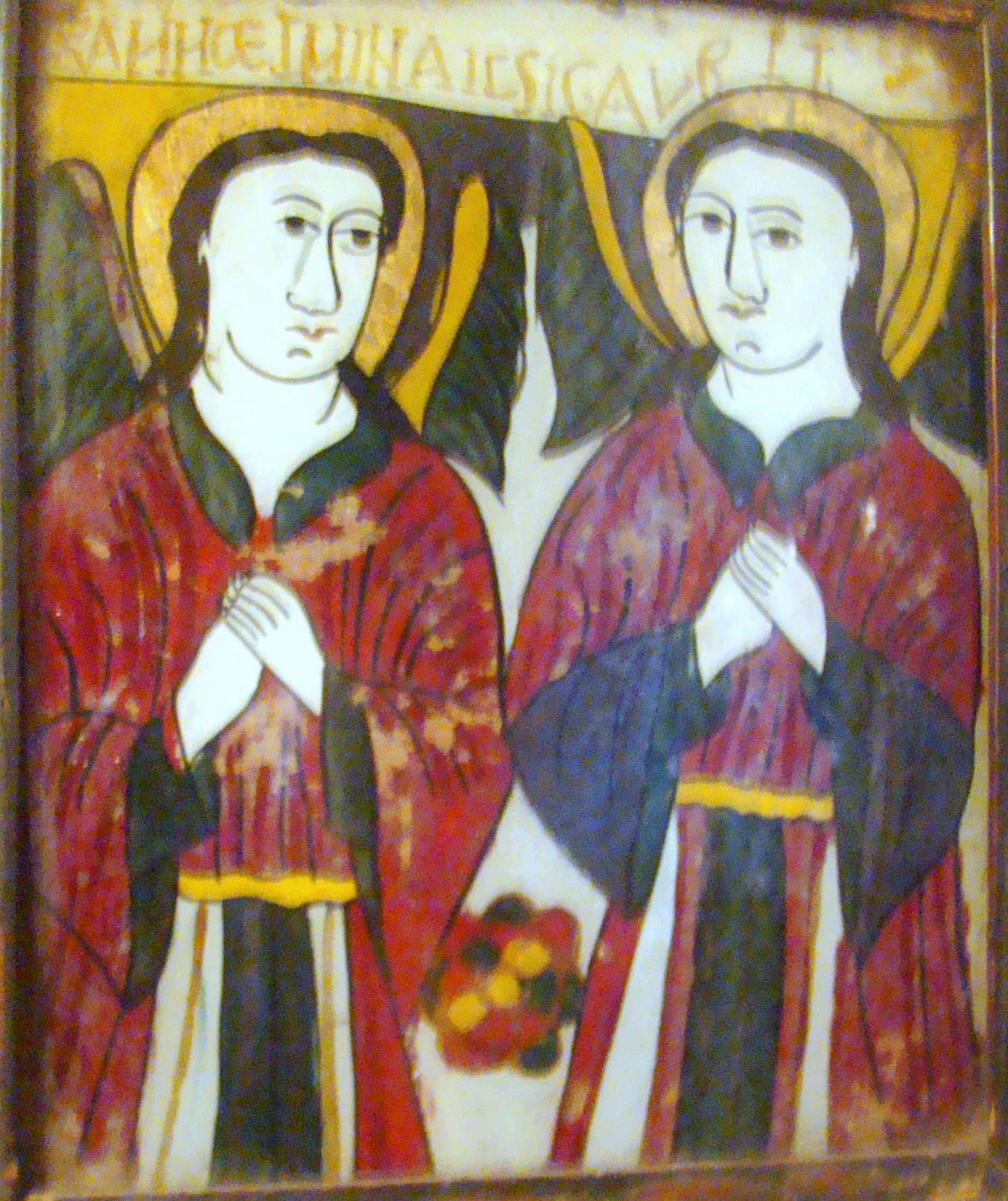 Biserica de lemn „Sfinții Arhangheli” din Reghin, județul Mureș